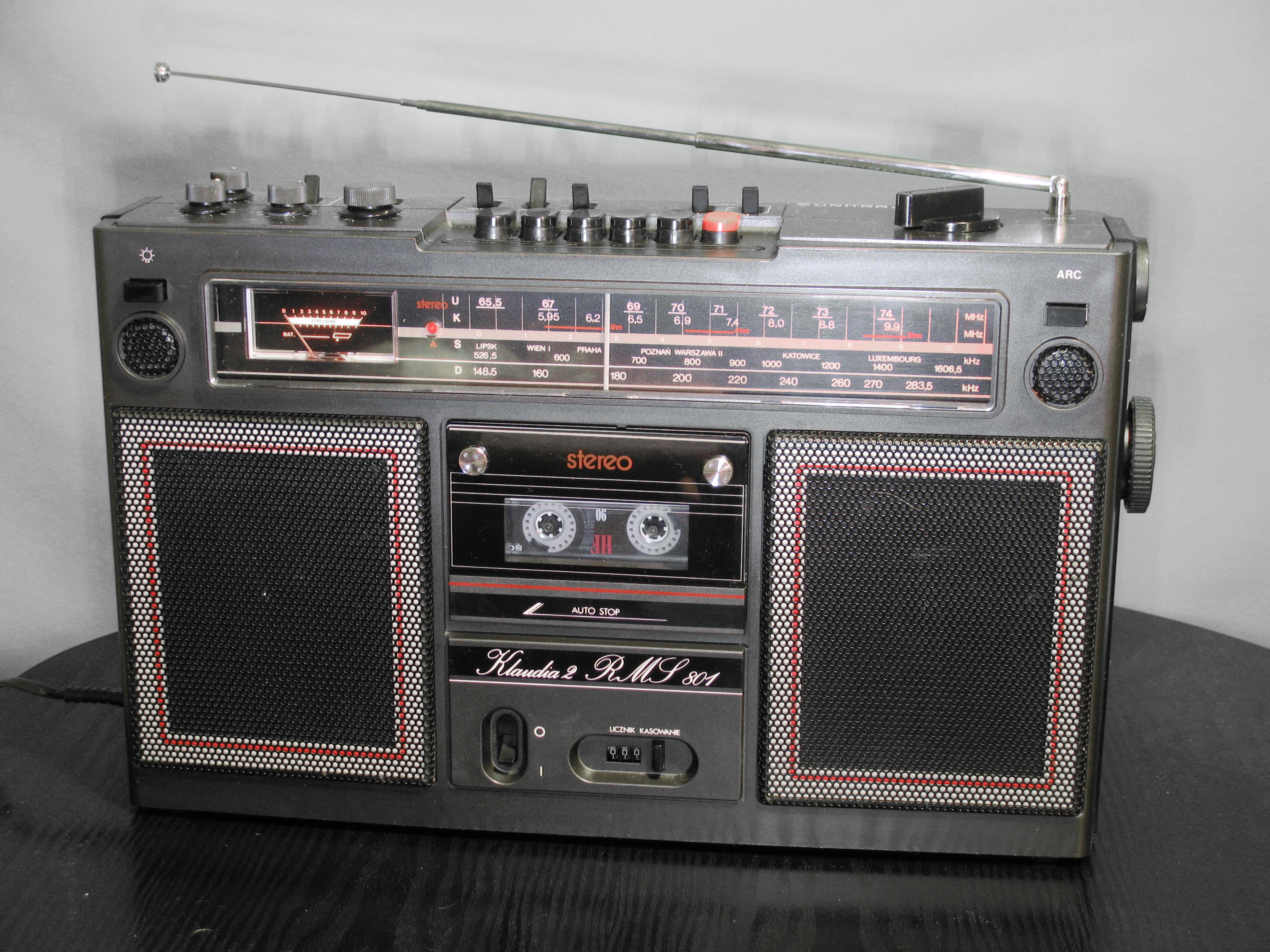 Radiomagnetofon Klaudia RMS 801